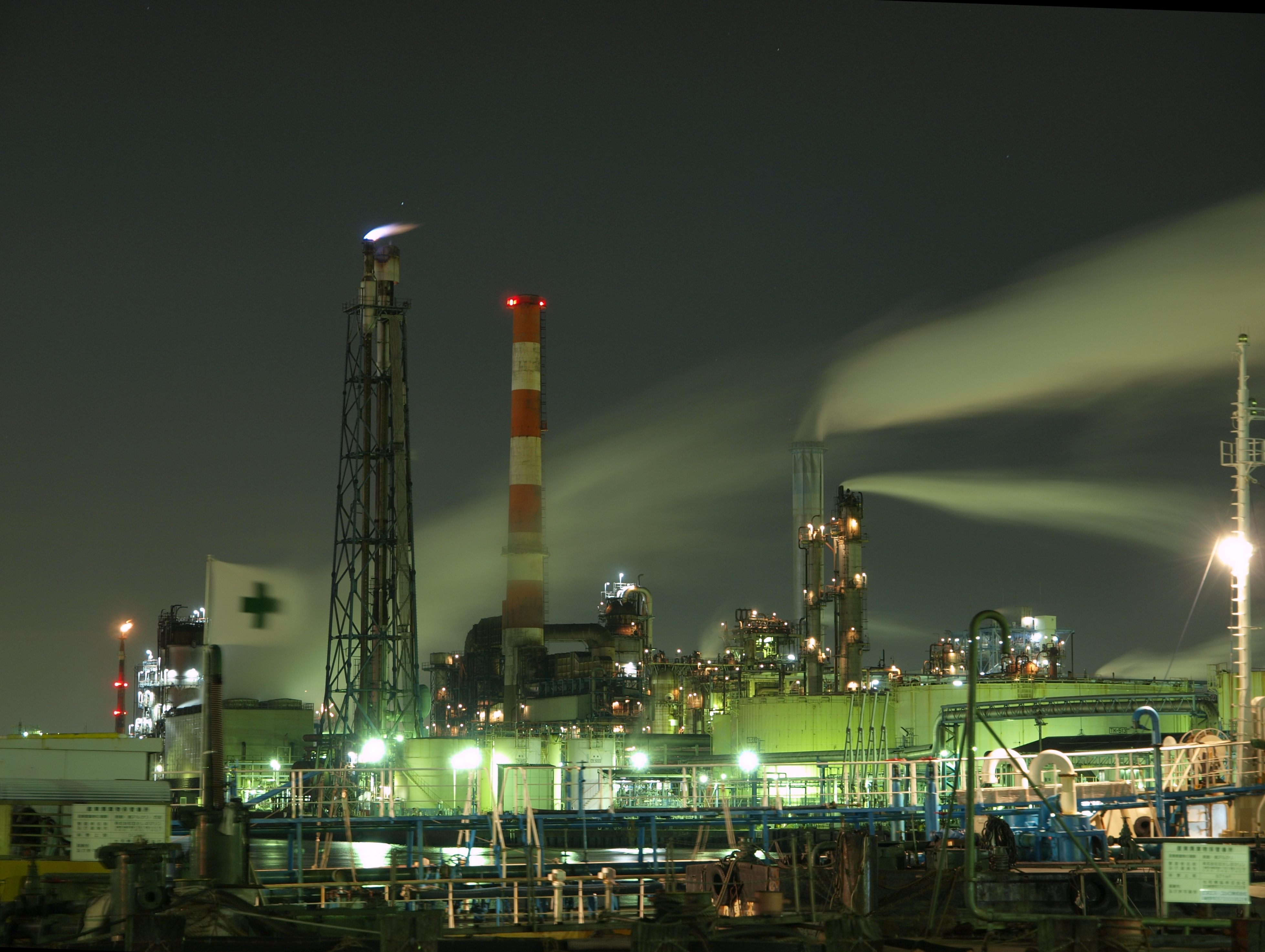 Mizue , Kawasaki